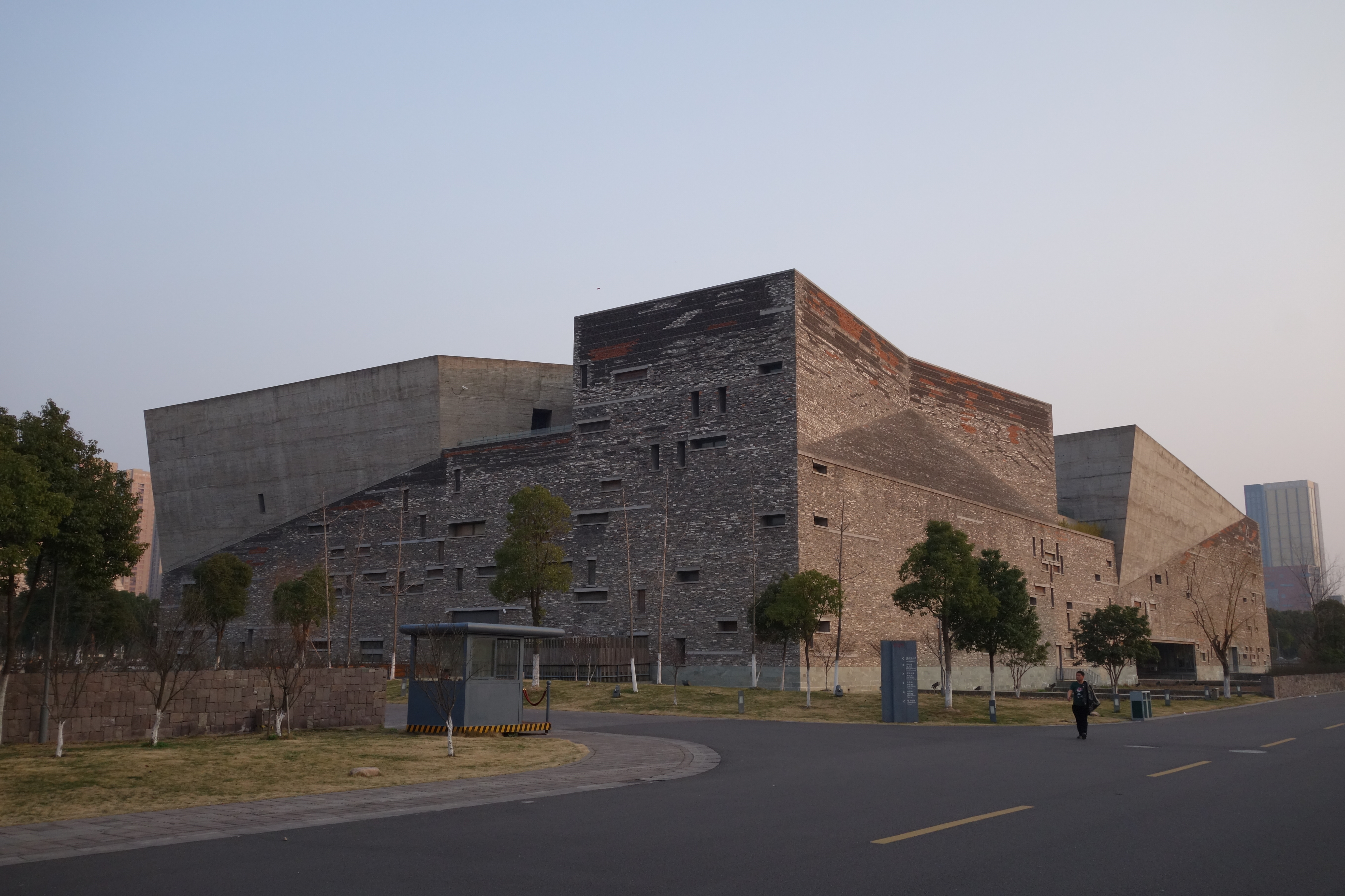 宁波博物馆北面